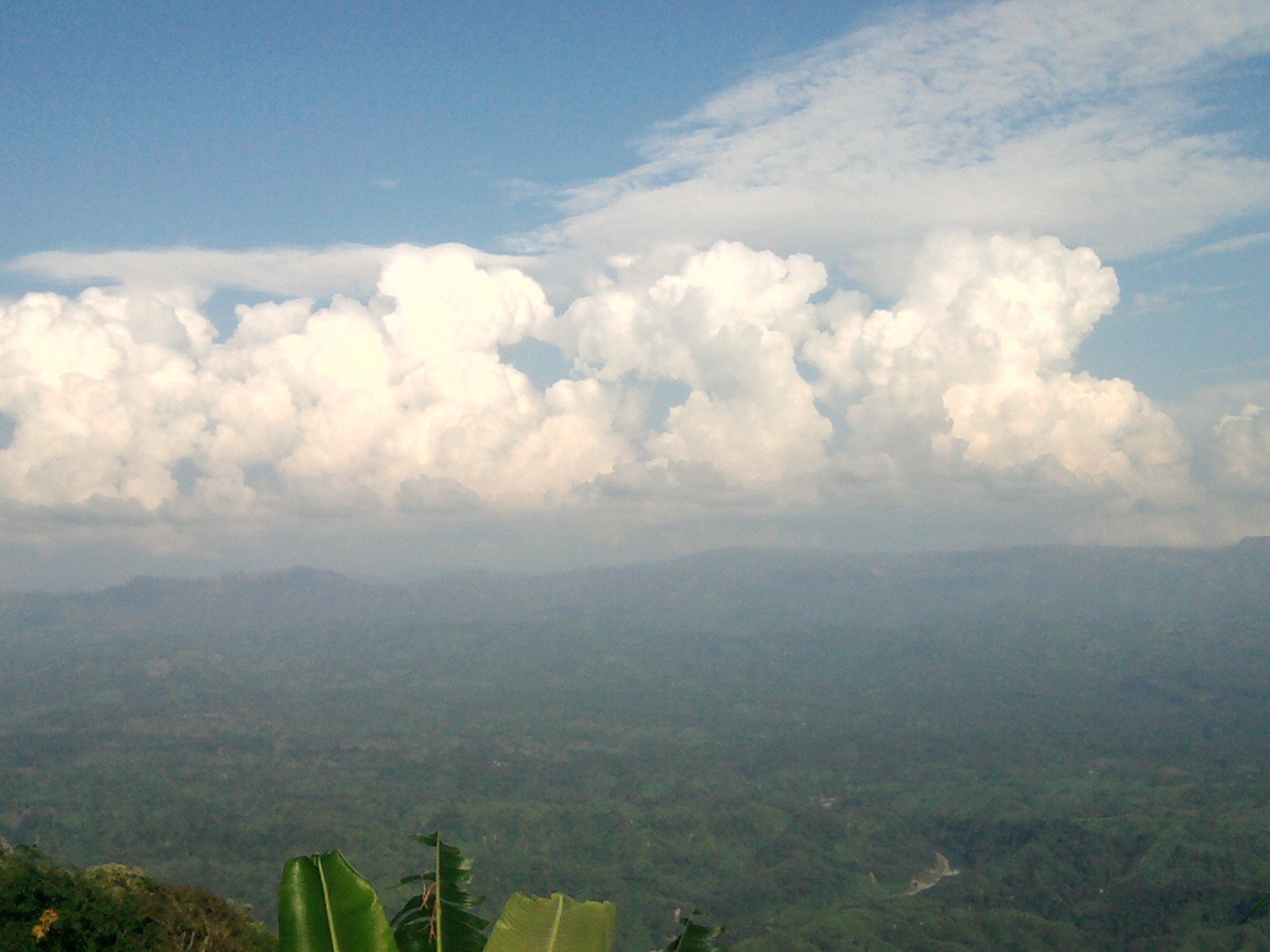 Lama Upazila, Bangladesh